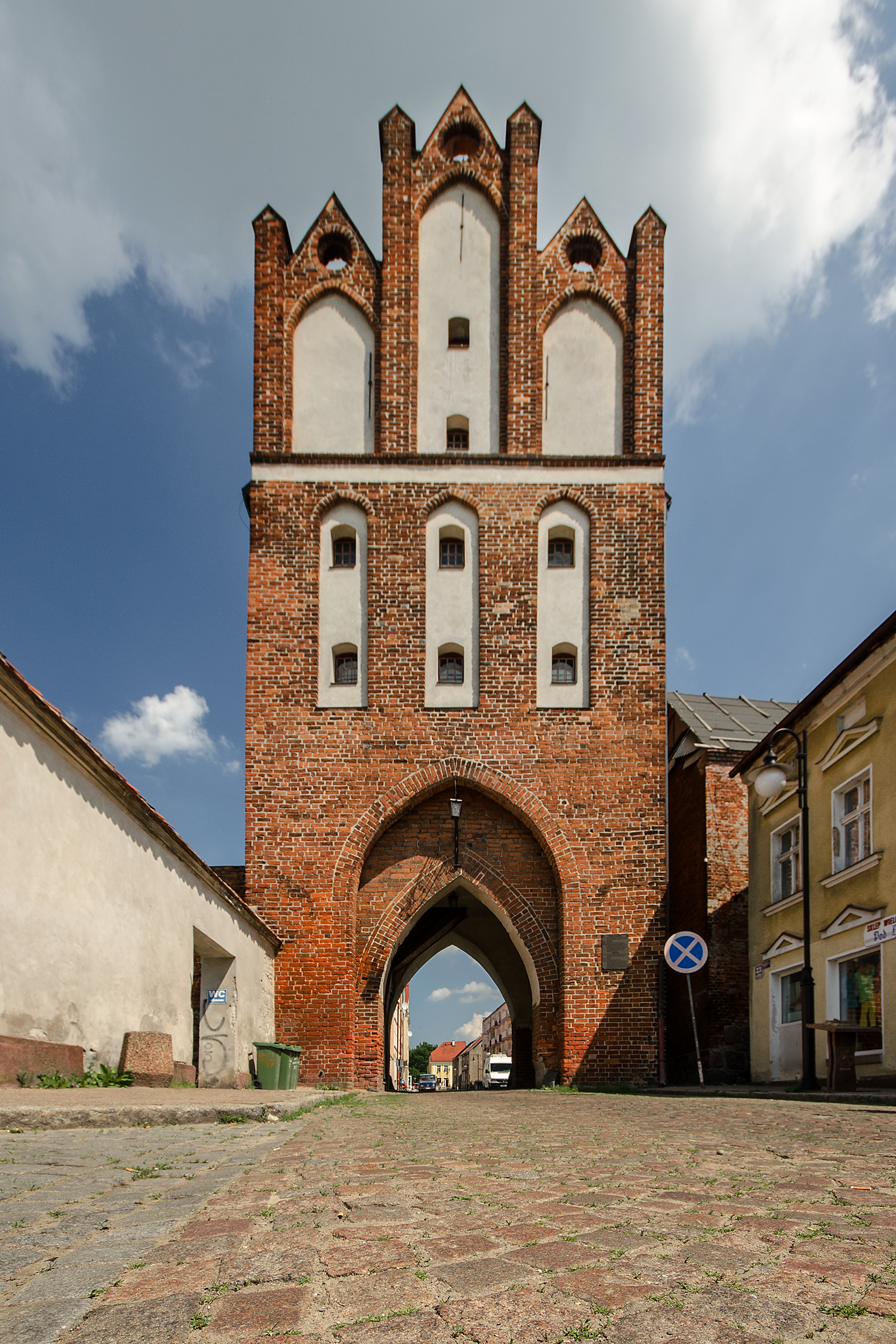 Pasłęk, pozostałości obwarowań miejskich, XIV, XVIII